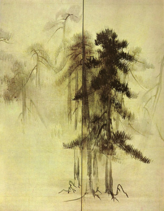 Bois de pins détail d'un paravent par le peintre japonais Hasegawa Tōhaku des XVIe et XVIIe siècles. Encre sur papier. Dimensions du paravent: 156x346,2 centimètres. Conservée au Musée national de Tokyo.